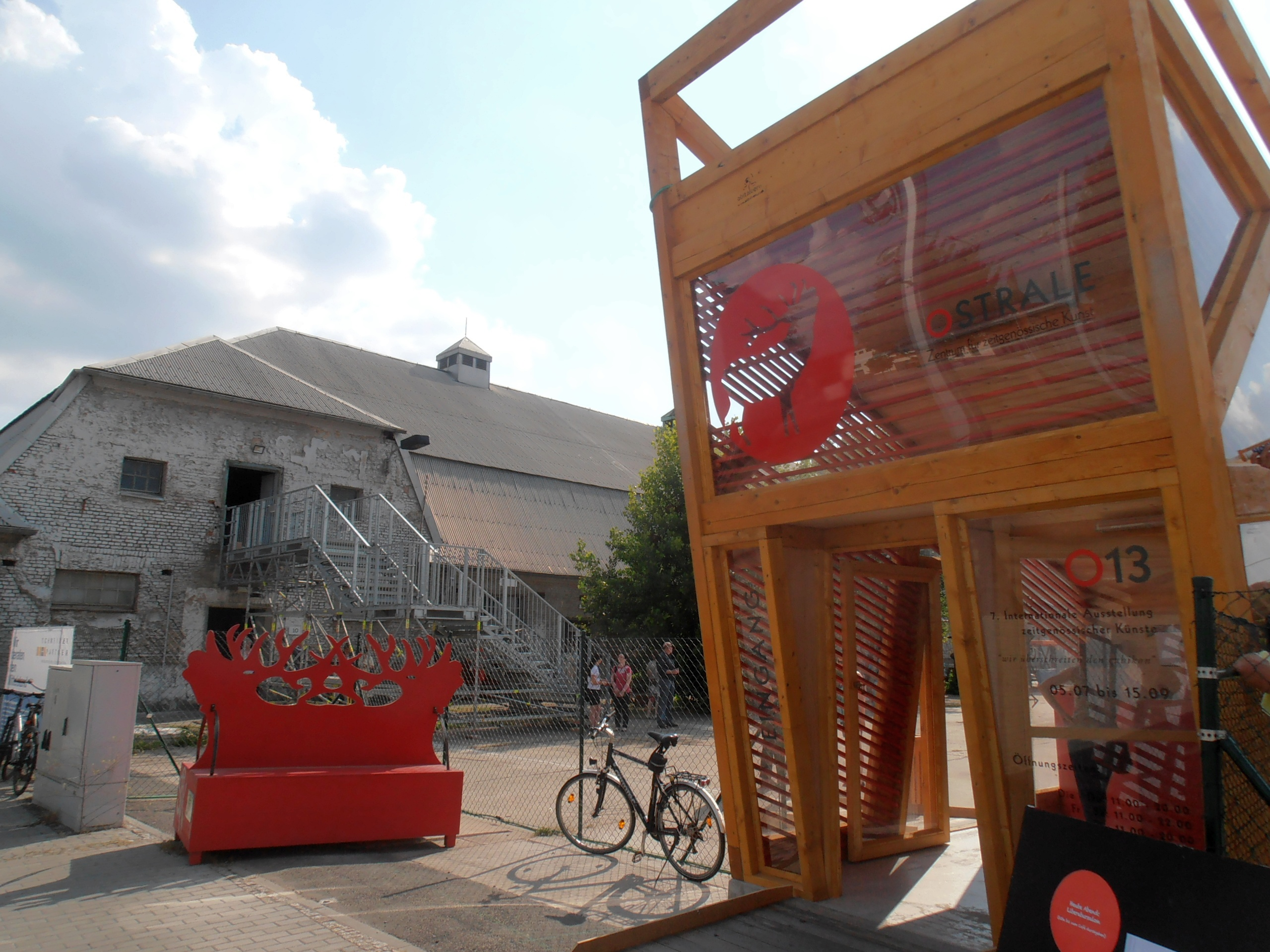 Ostrale 2013 Eingang